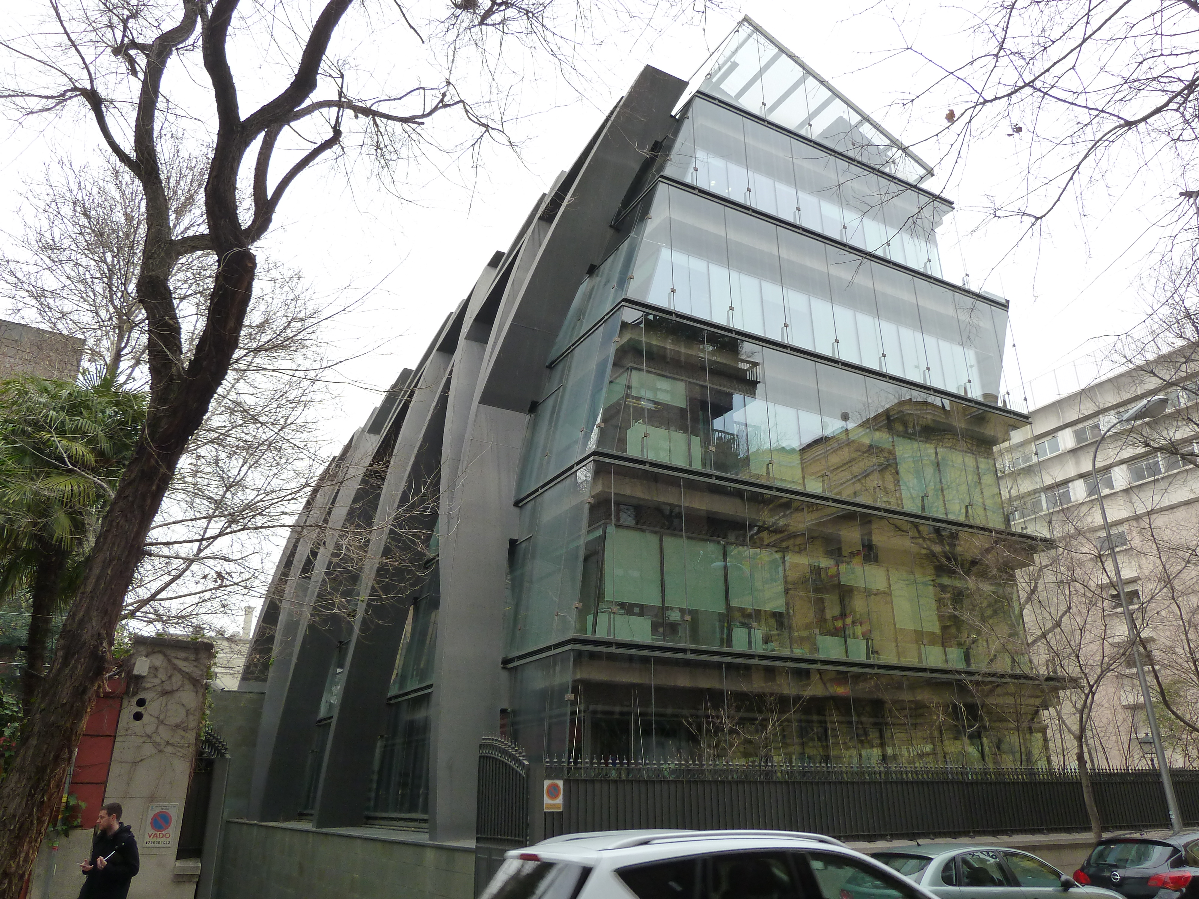 Fachada trasera del Auditorio Rafael del Pino